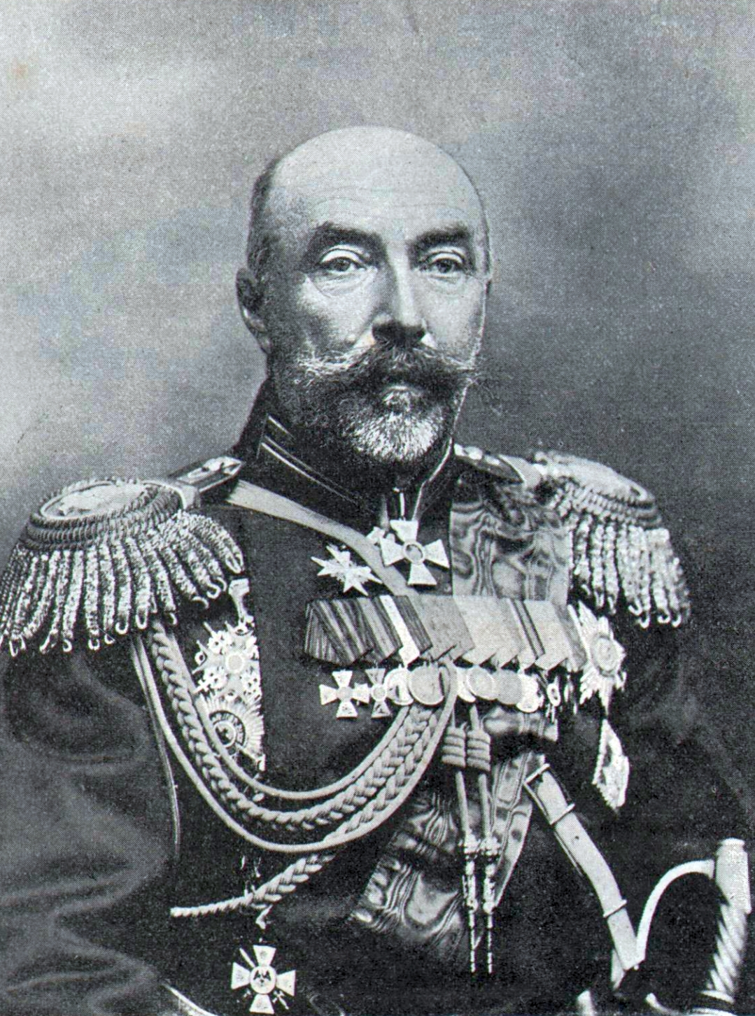 Стессель, Анатолий Михайлович